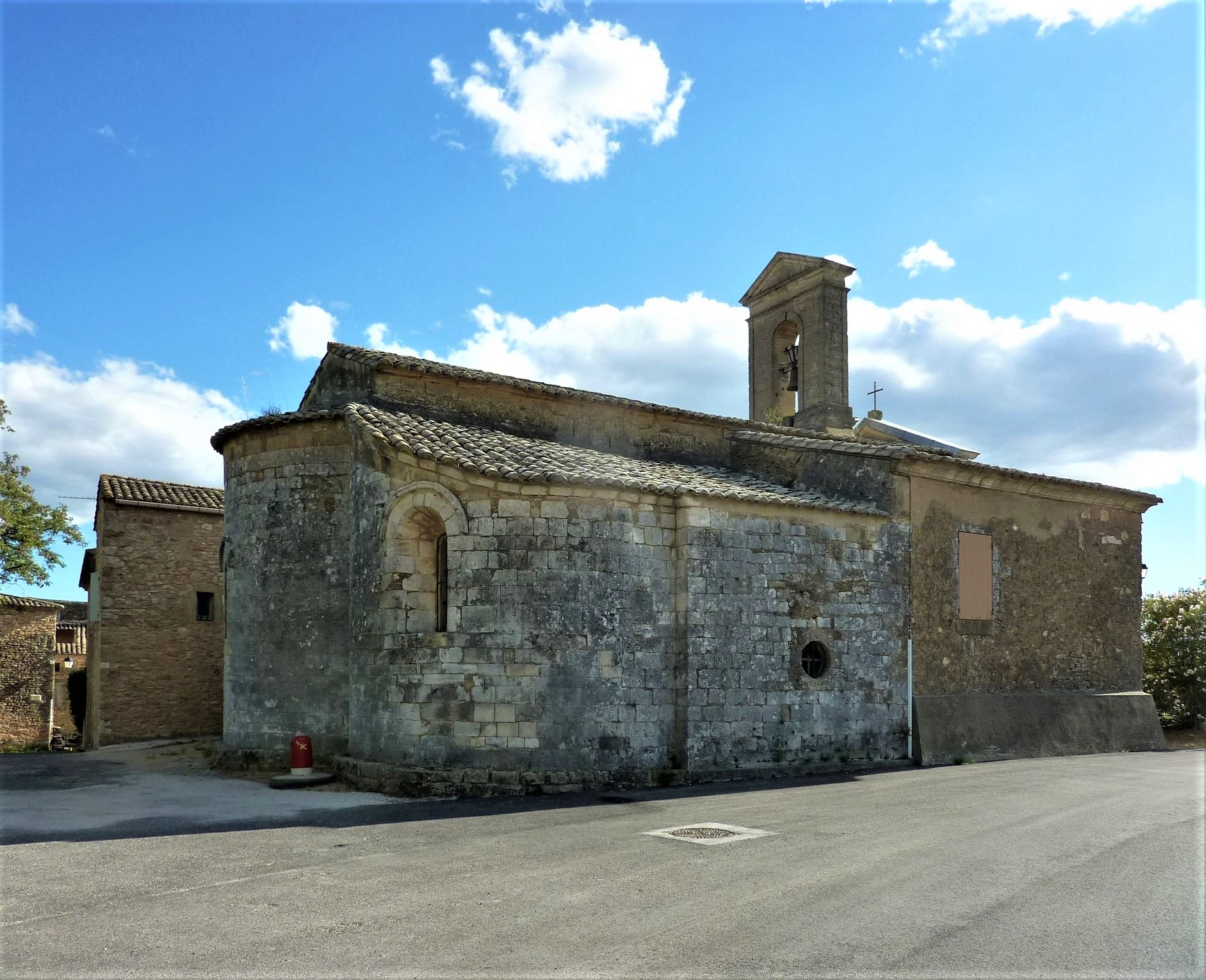 Église de Notre-Dame de Gattigues (Aigaliers)